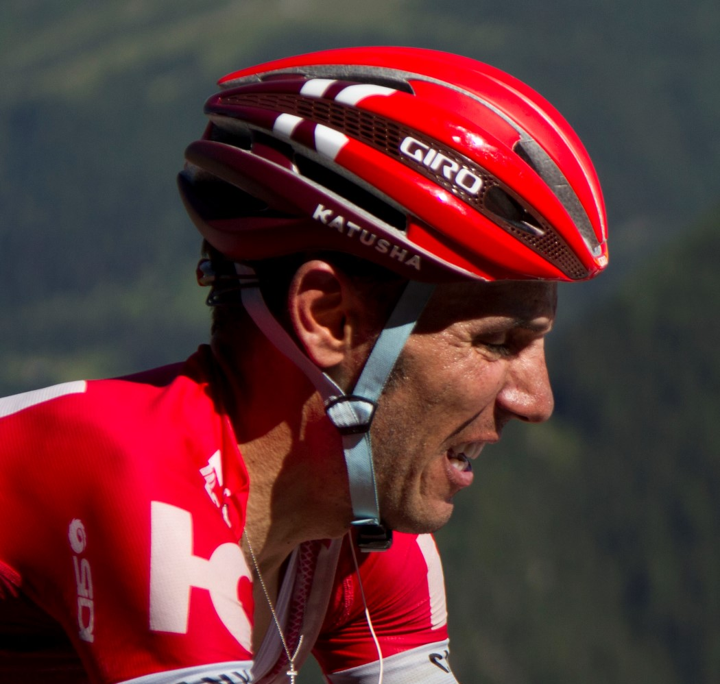 257 rodriguez